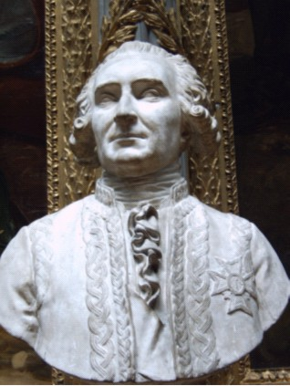 buste de la galerie des batailles du château de Versailles